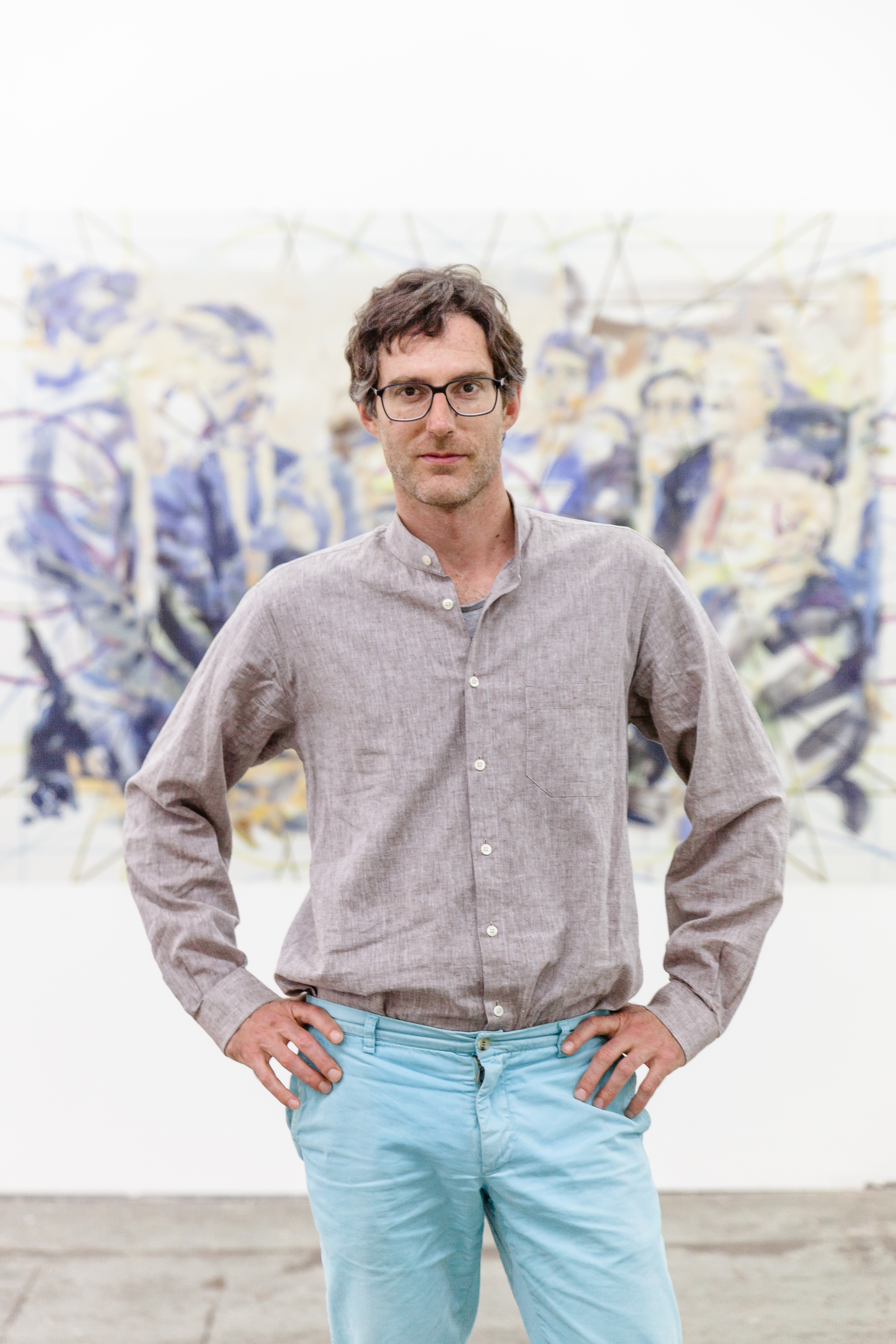 Jochen Plogsties vor seinem Werk in 2019